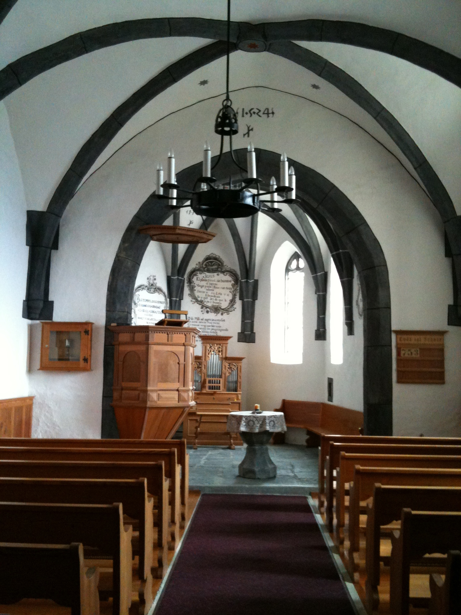 reformierte Kirche Scheid, Kanton Graubünden